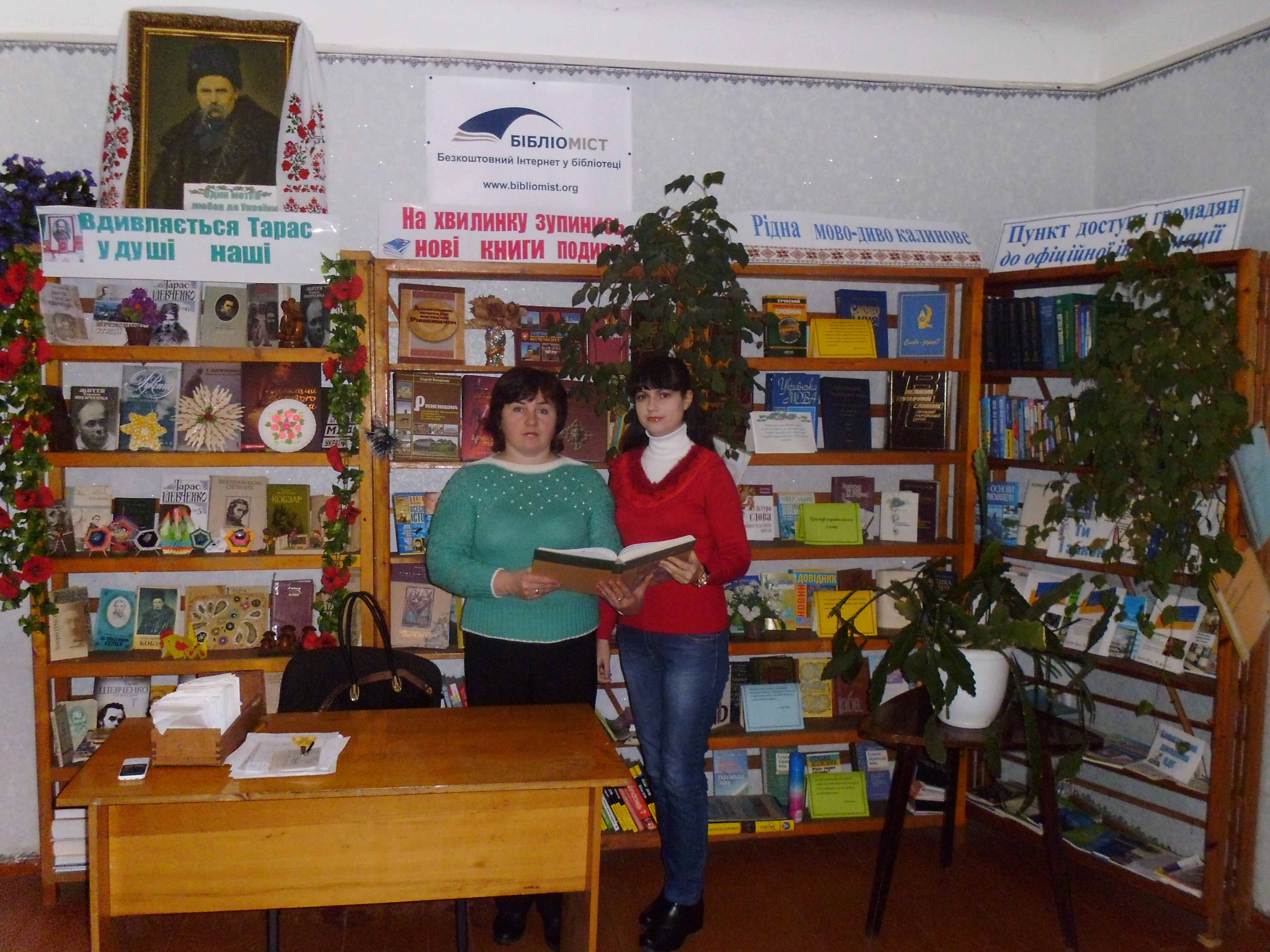 Завідуюча Геращенко Наталія та бібліотекар Ковальчук Ірина